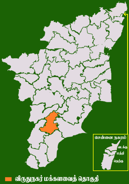 தமிழக வரைபடத்தில் உள்ள விருதுநகர் மக்களவைத் தொகுதி